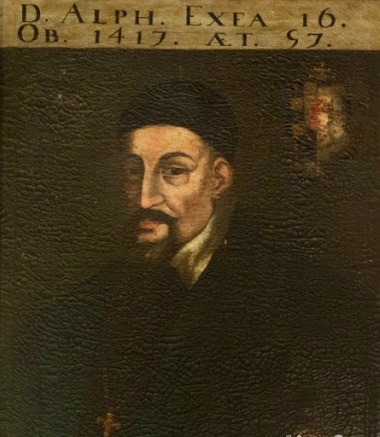 Retrato del prelado español Alonso de Egea (m. 1417), que fue arzobispo de Sevilla y anteriormente obispo de las diócesis de Ávila y Zamora. Está enterrado en la capilla de San Laureano de la catedral de Sevilla, (España).